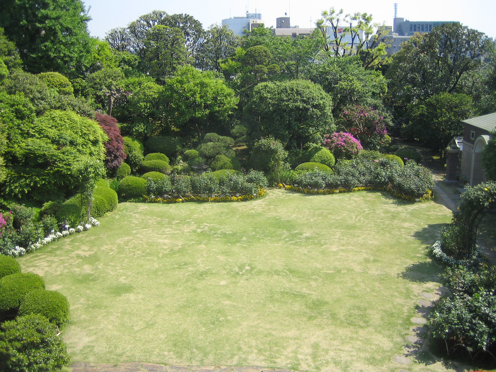 Hatoyama Hall (鳩山会館), at Otowa, Bunkyo, Tokyo, Japan